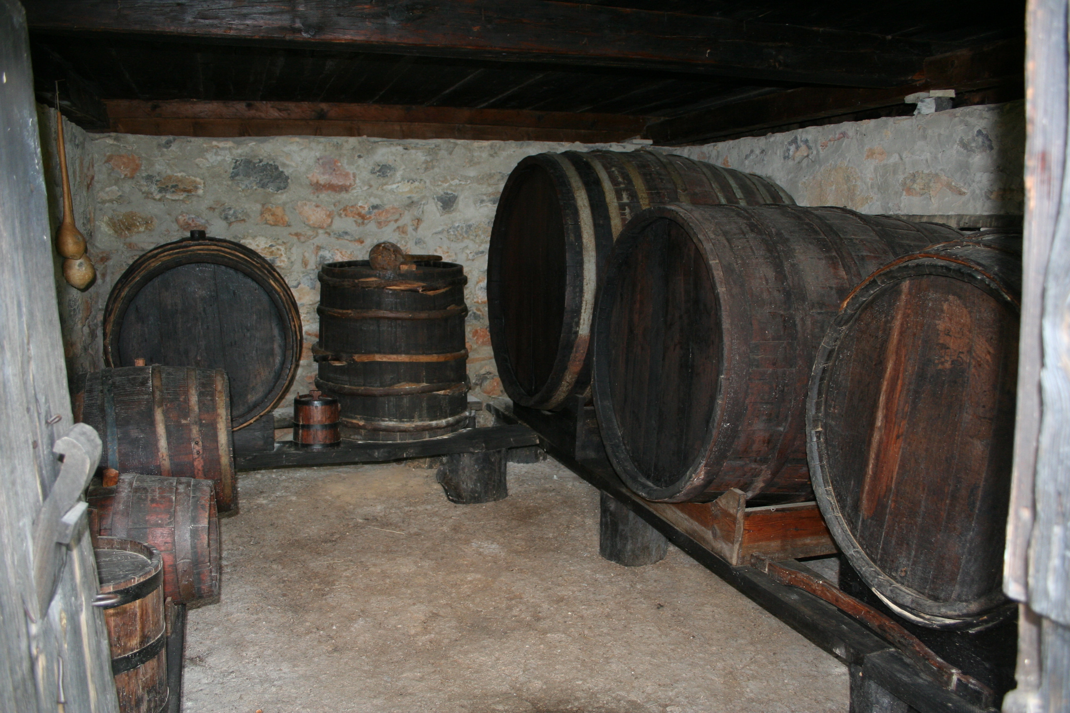 Muzej na otvorenom "Staro selo" Sirogojno